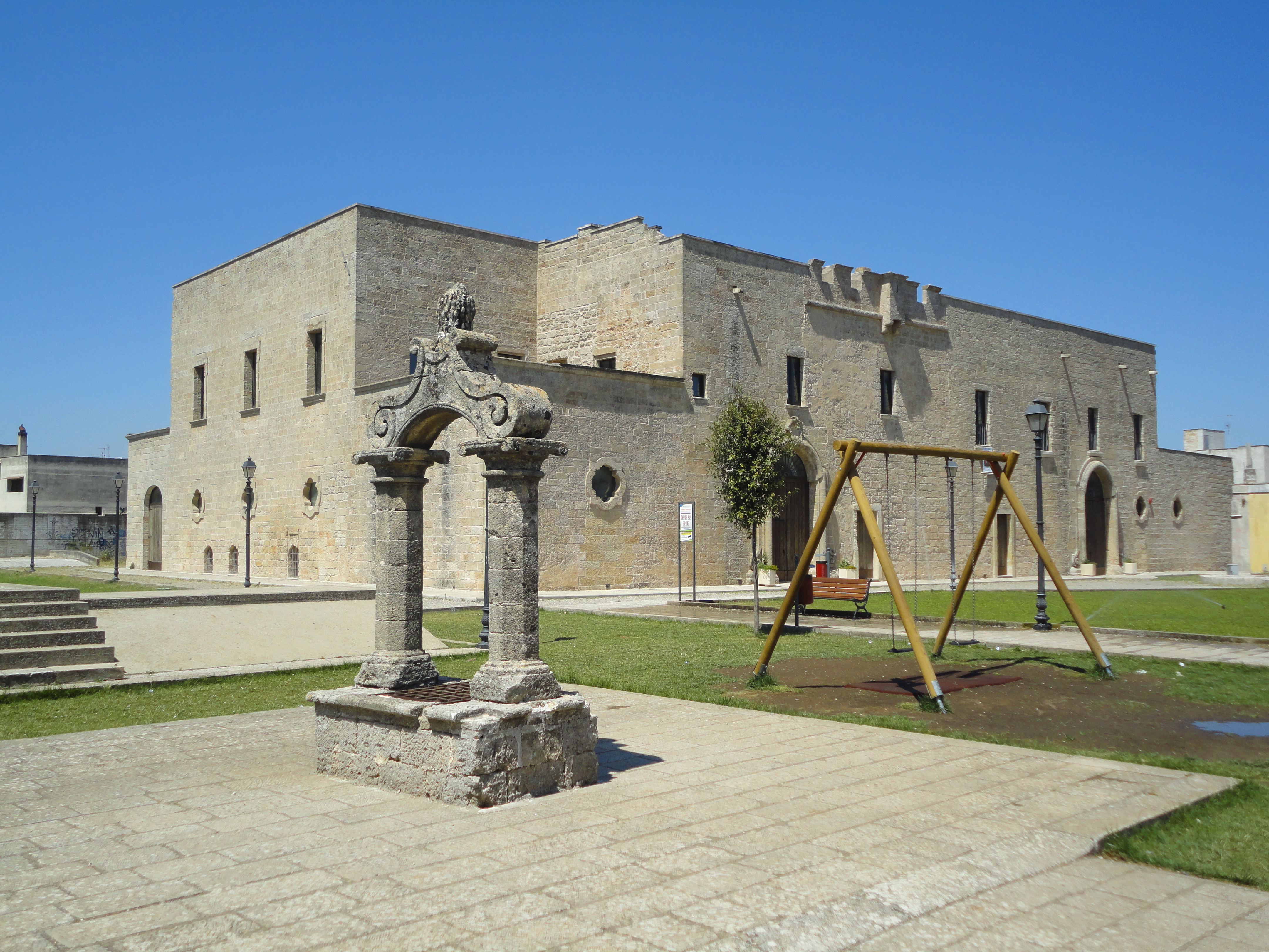 Pozzo e Palazzo Baronale di Collepasso, Lecce